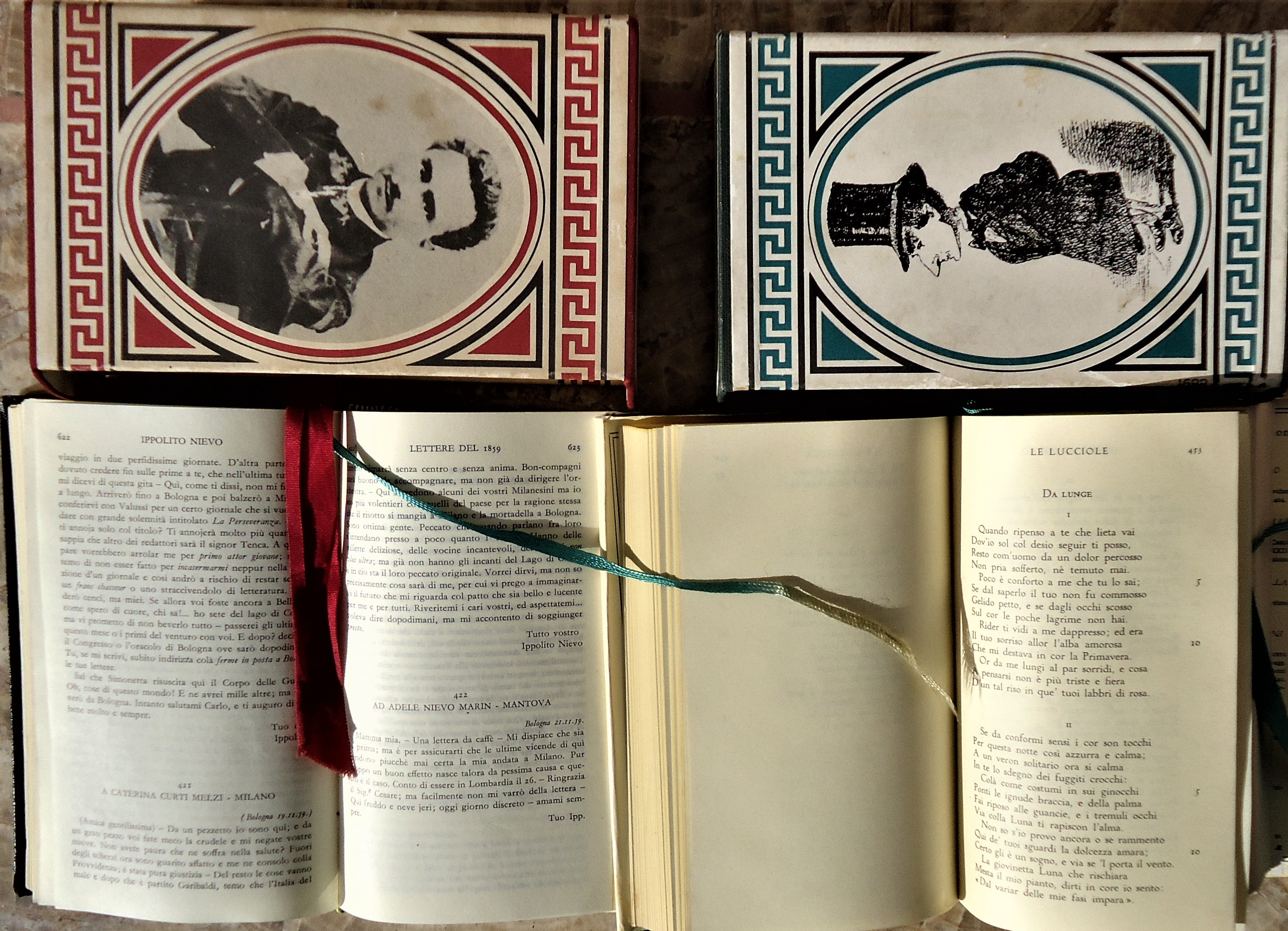 Custodie e pagine interne di: Ippolito Nievo "Epistolario", 1980 e Ippolito Nievo "Poesie", 1970, edizioni a cura di Marcella Gorra. Edizioni Mondadori. (coll. Fausta Samaritani-Nievo)